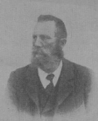 Karl Niedrist (1863-1926), rakouský křesťansko sociální politik